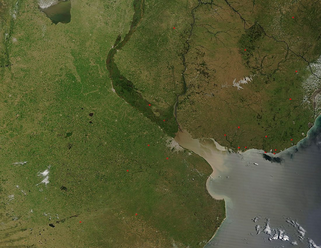 Imágen satelital del Río de la Plata (los puntos rojos indican focos de incendio